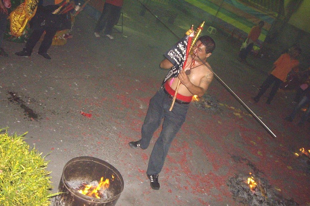 乩童—用長銅針來貫穿臉頰而封口（俗稱灌口針）儀式。